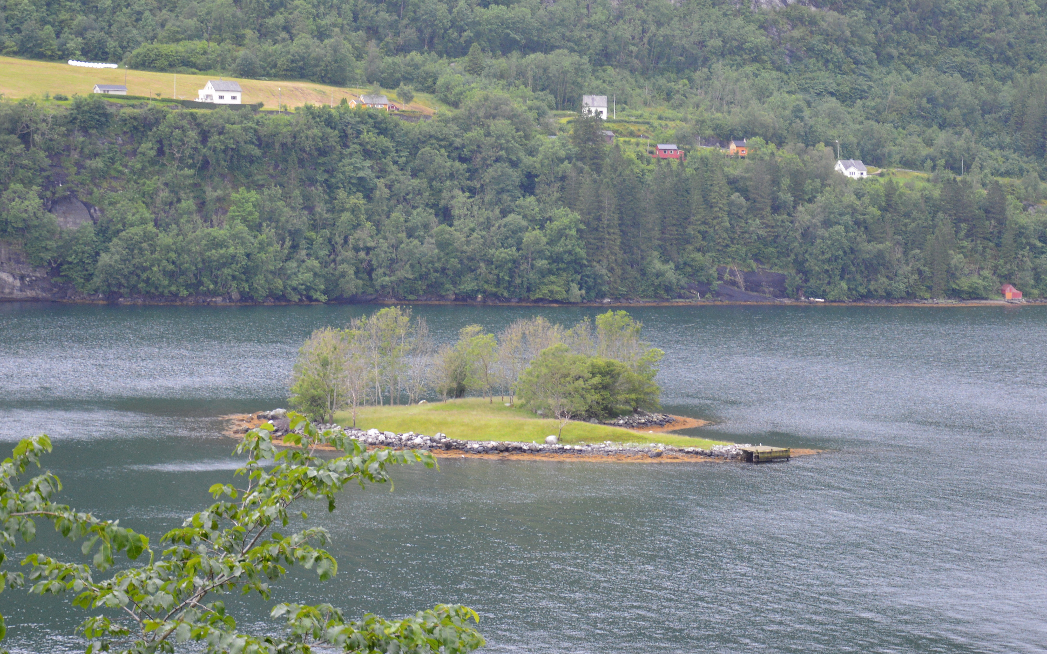 Rossholmen